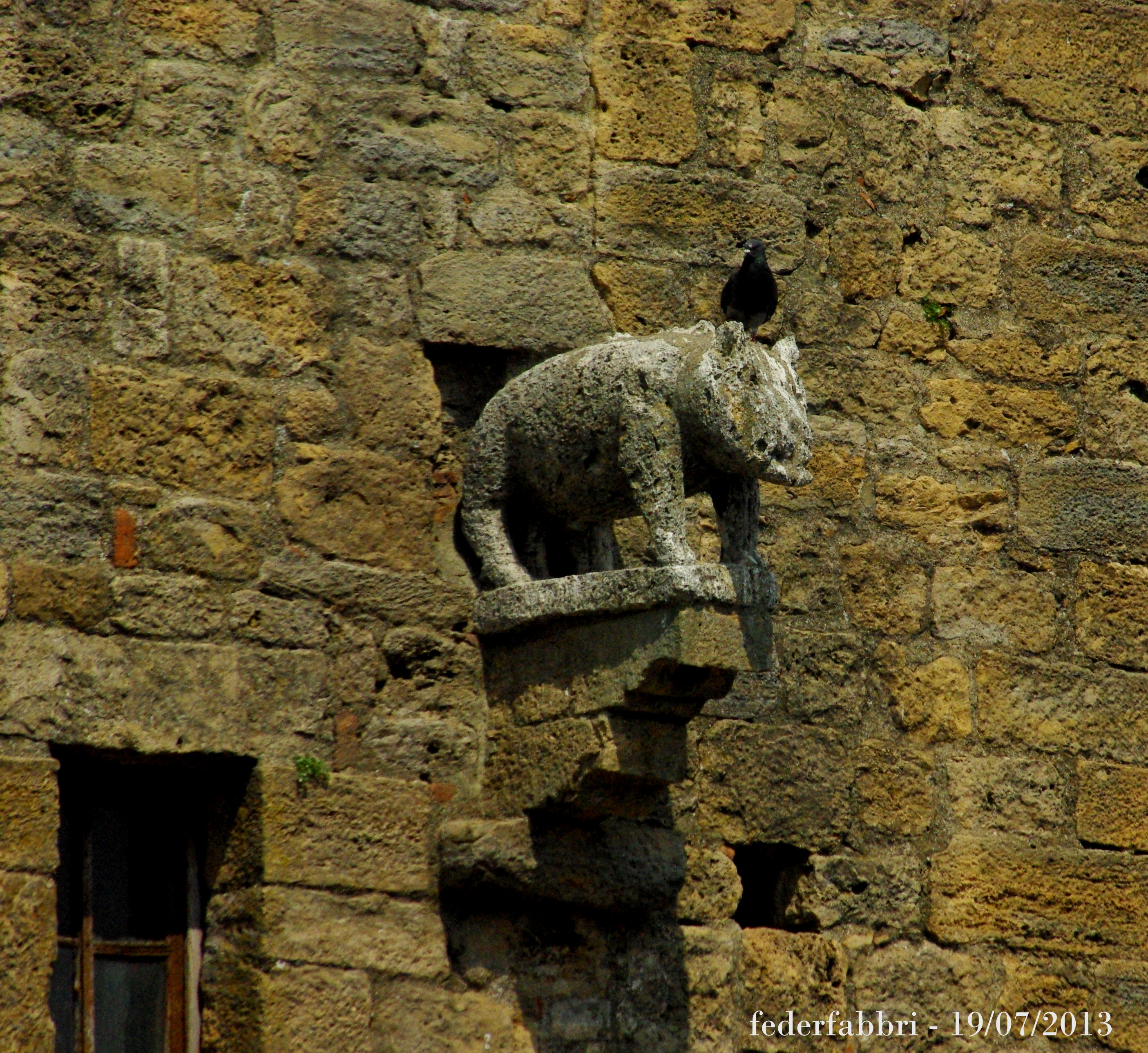 Particolare della Torre del Porcellino visto dal Palazzo dei Priori. Volterra (PI) This is a photo of a monument which is part of cultural heritage of Italy.